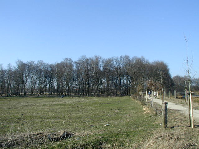 Foto zelf gemaakt op 23 maart 2003. Keunen